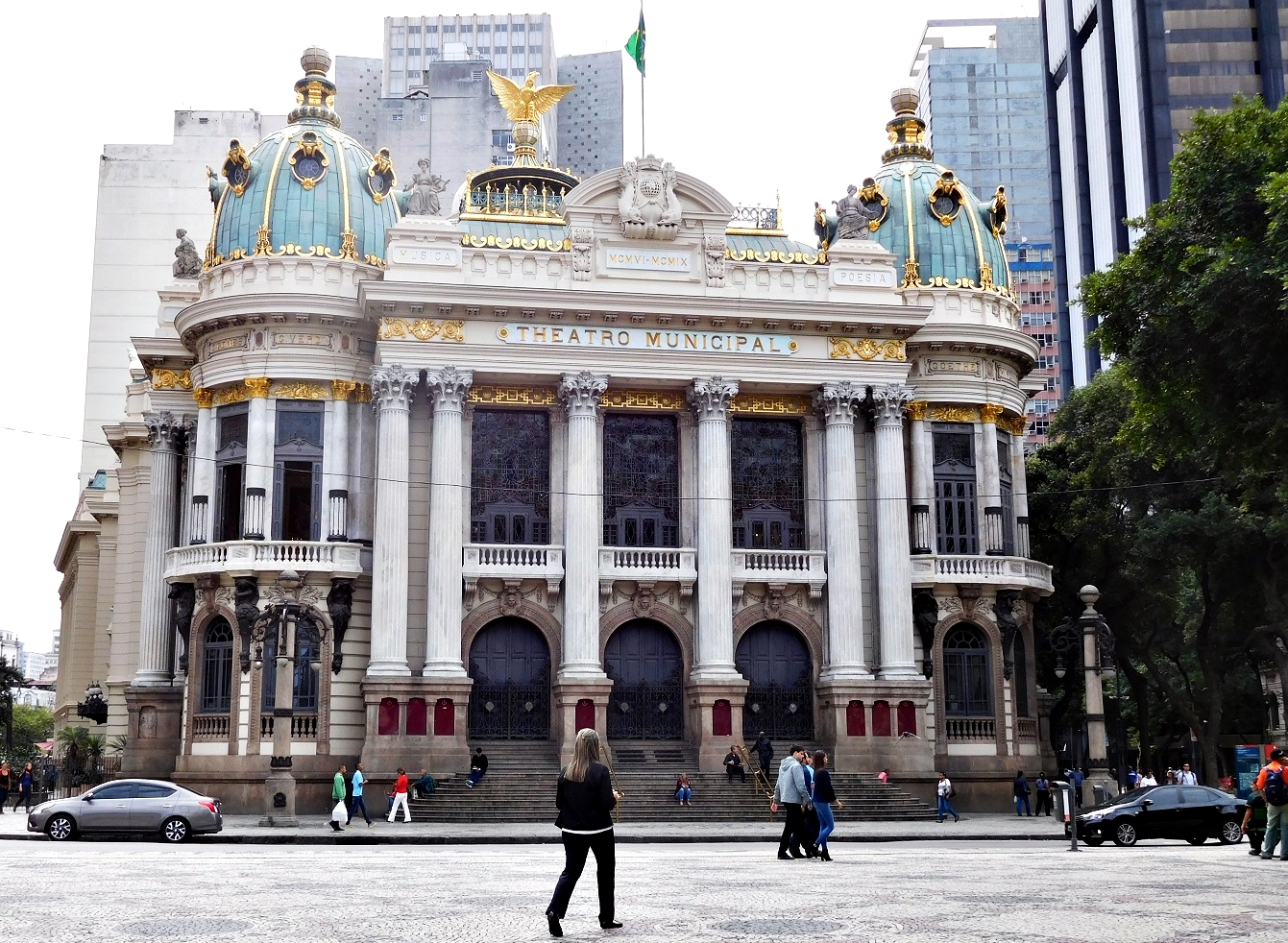 古都リオの改修された市立劇場正面